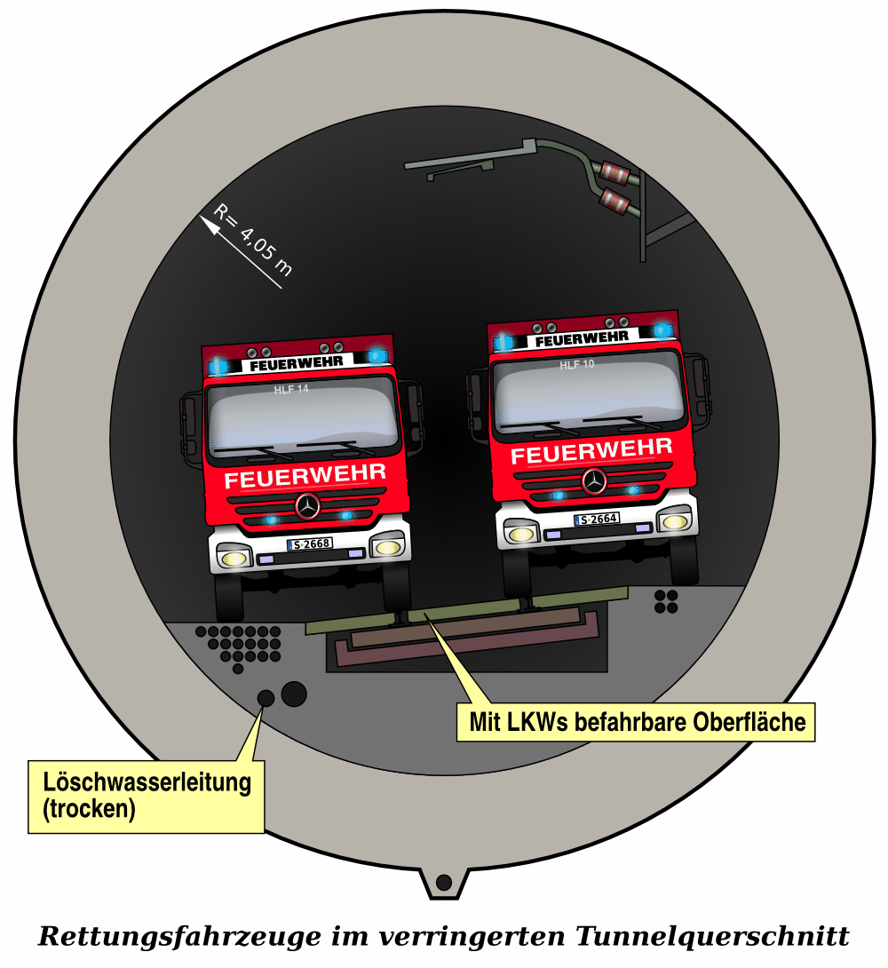 Tunnel-Sonderquerschnitt mit lichter Weite 8,10 m, wie er teilweise für die Tunnel im Bahnprojekt Stuttgart 21 geplant ist. Die Darstellung zeigt die räumlichen Verhältnisse bei der Befahrung des Tunnels durch LKWs zu Rettungszwecken. Grundlage für die Grafik ist eine technische Darstellung in PFA 1.2 Fildertunnel Anlage 10.2.2